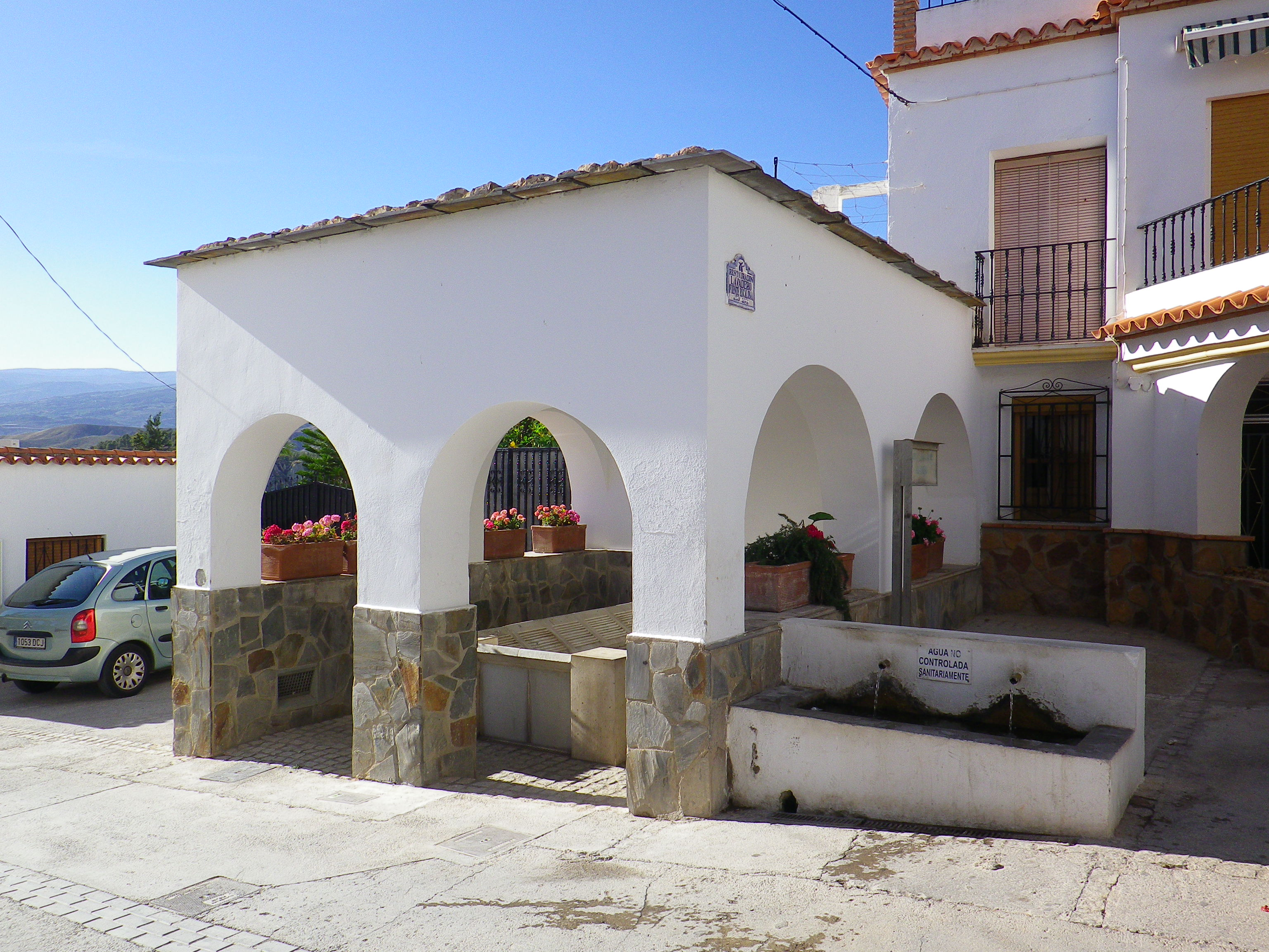 Lavadero público y caños de agua.